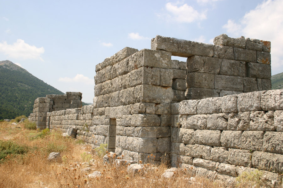 Reste der Befestigungsmauern der antiken griechischen Stadt Eleutherai.